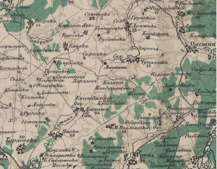 Фрагмент карти Полтавської губерн,1868 р з зображенням с. Комиші та навколишньої місцевості